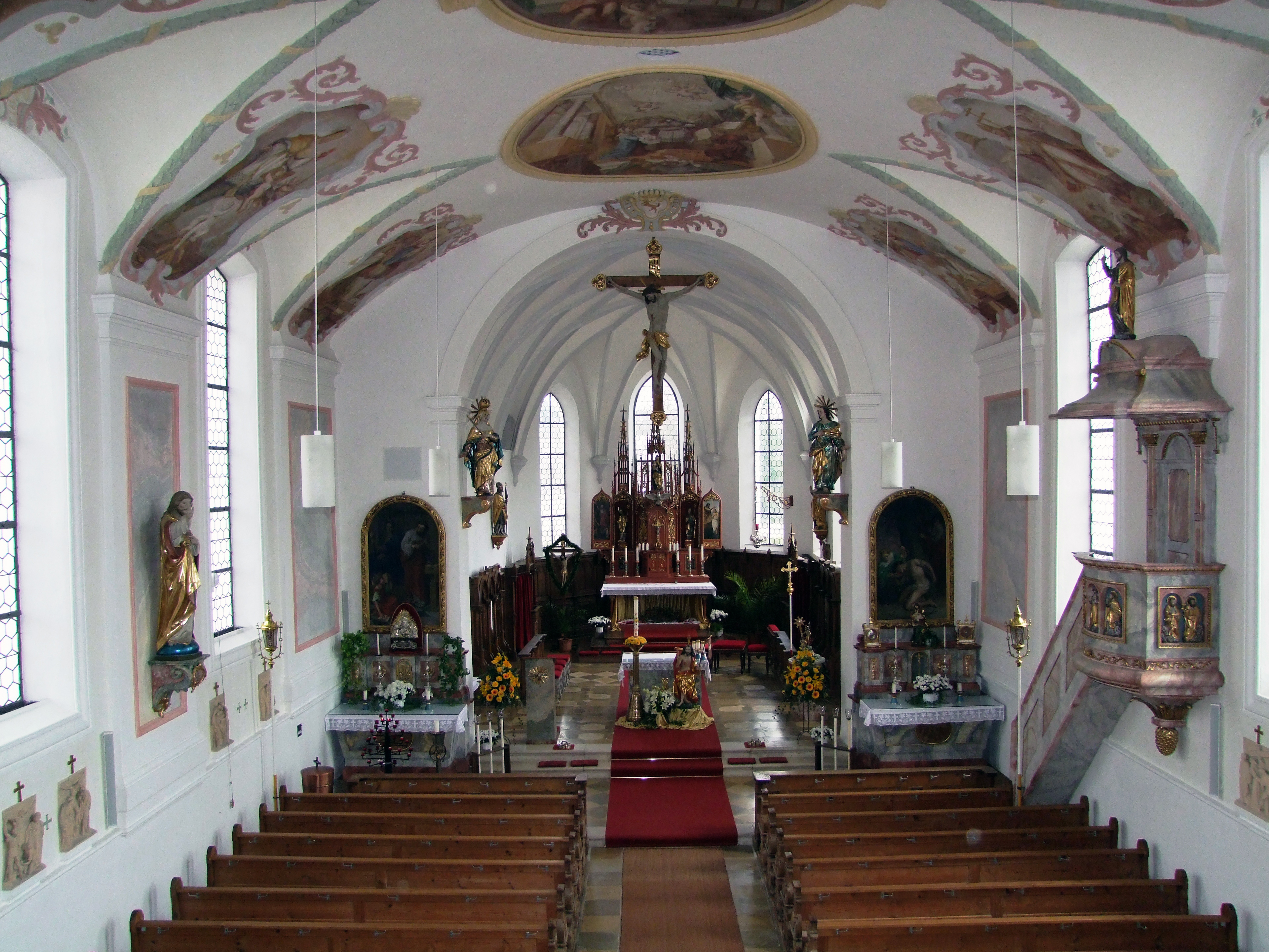 Mariä Himmelfahrt, Pfarrkirche im oberschwäbischen Illerbeuren bei Memmingen